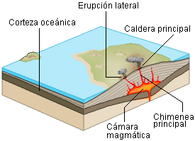 Autor: Usuario:Lmb